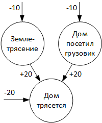 Explaing away на русском языке